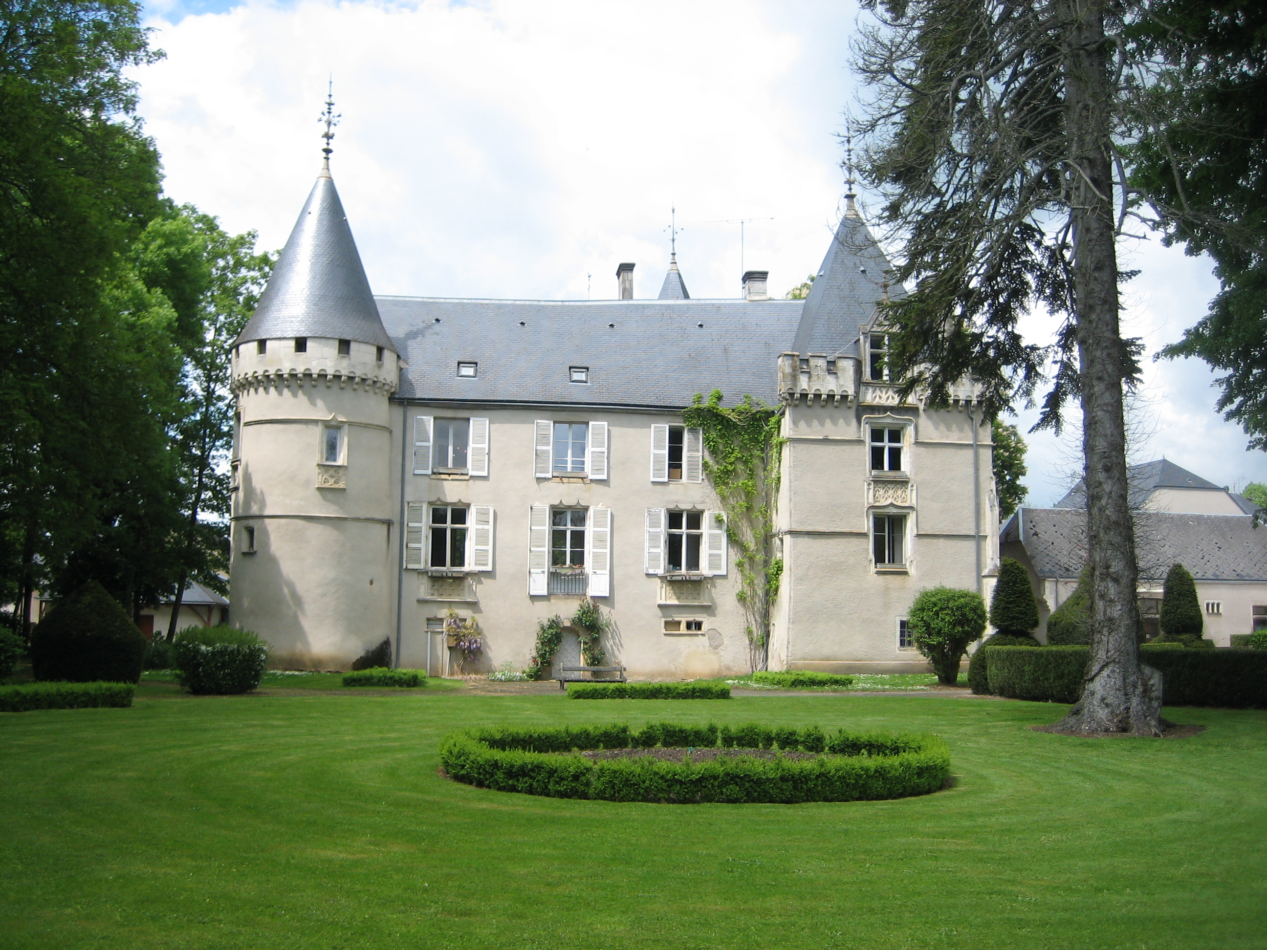 Ce château, où habitait Solange Clésinger, fille de George Sand, est maintenant la mairie de Montgivray